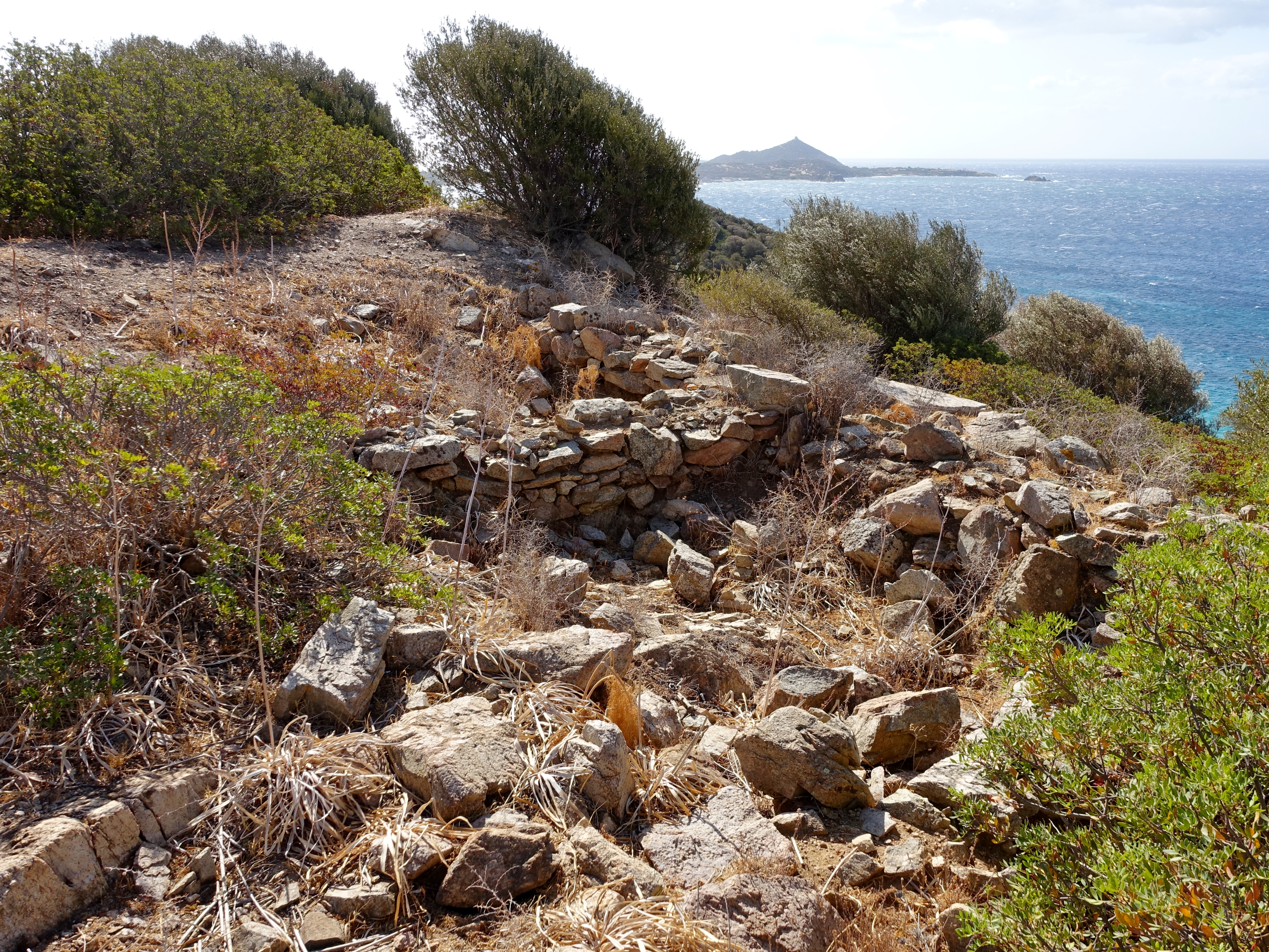 Phönizisches Heiligtum von Cuccureddus, Gemeinde Villasimius, Sardinien, Italien